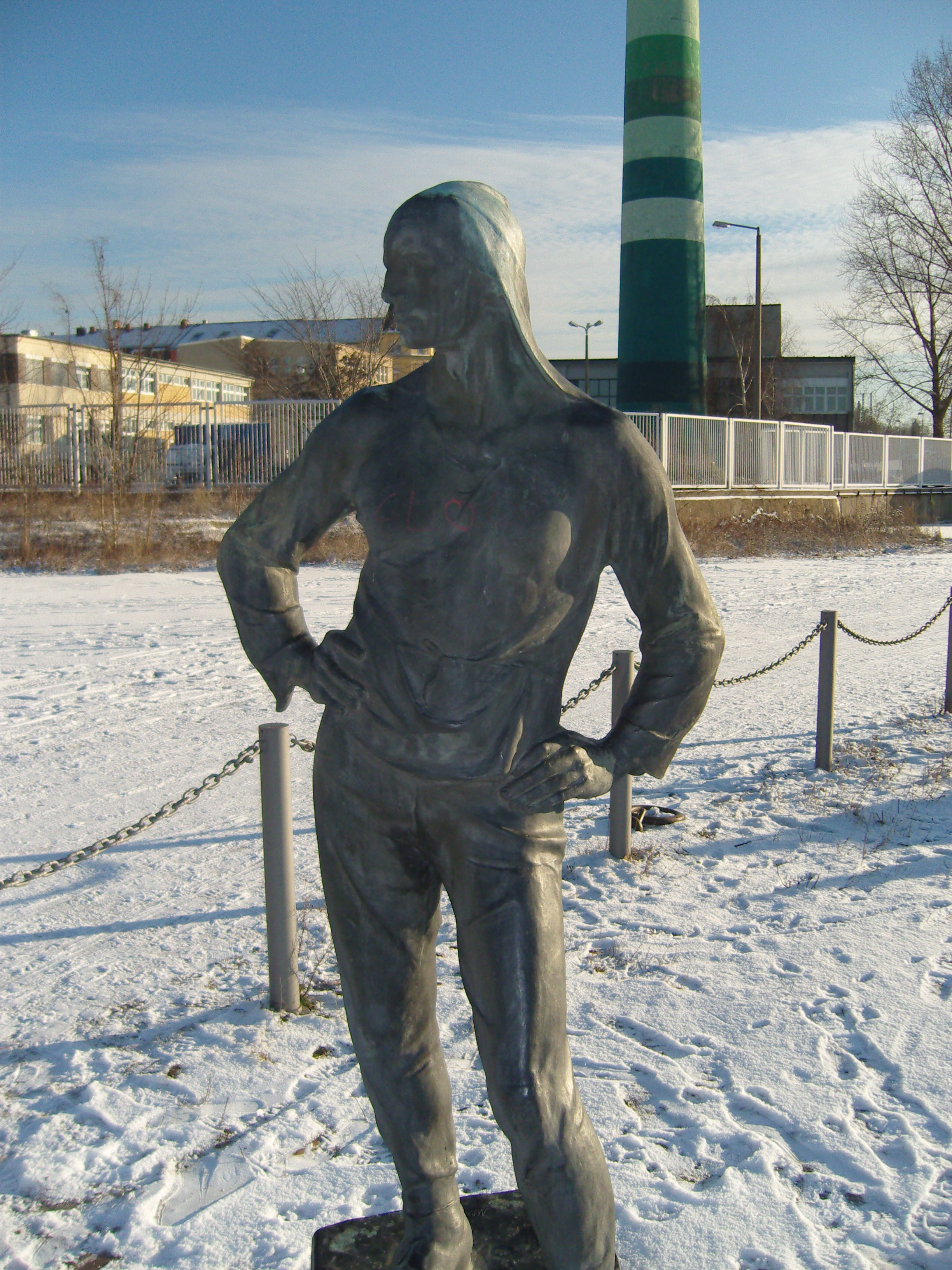 Constantin Meunier (belgisch, 1831-1905) Lastenträger, Bronzeplastik, circa 1890, Neustädter Hafen, Dresden, Deutschland.